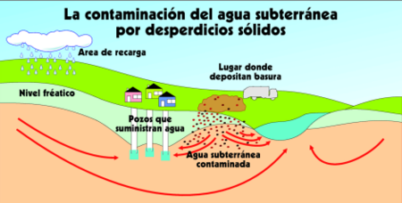 Original en